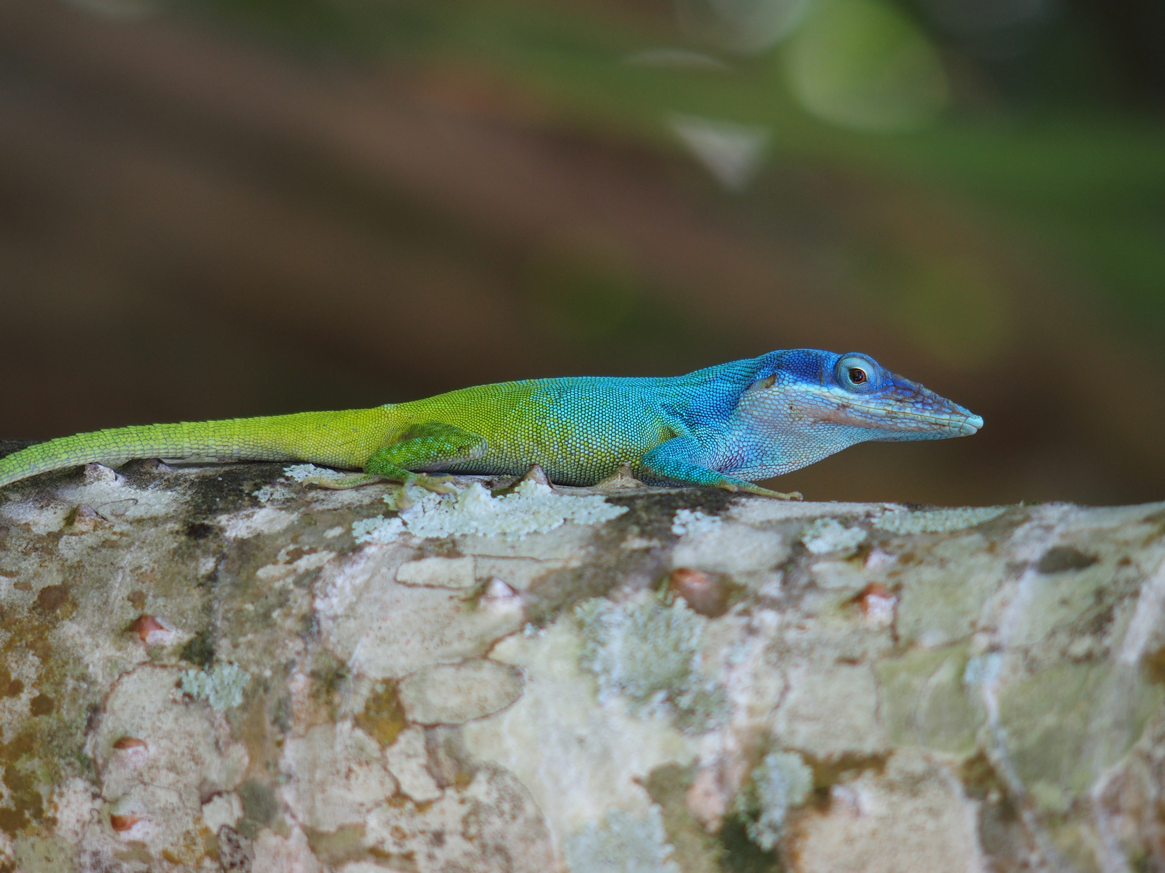 Anolis allisoni, Jardin Botánico de Cienfuegos